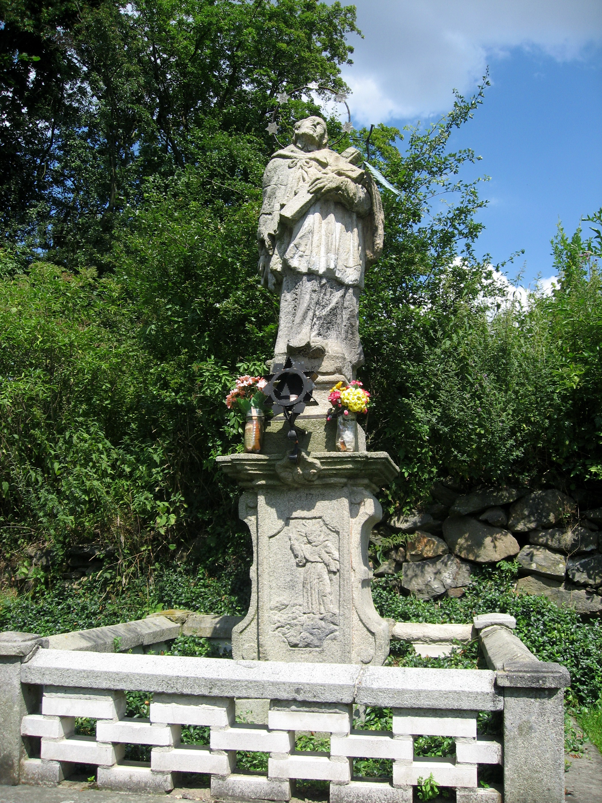 Věžnice, socha Jana Nepomuckého